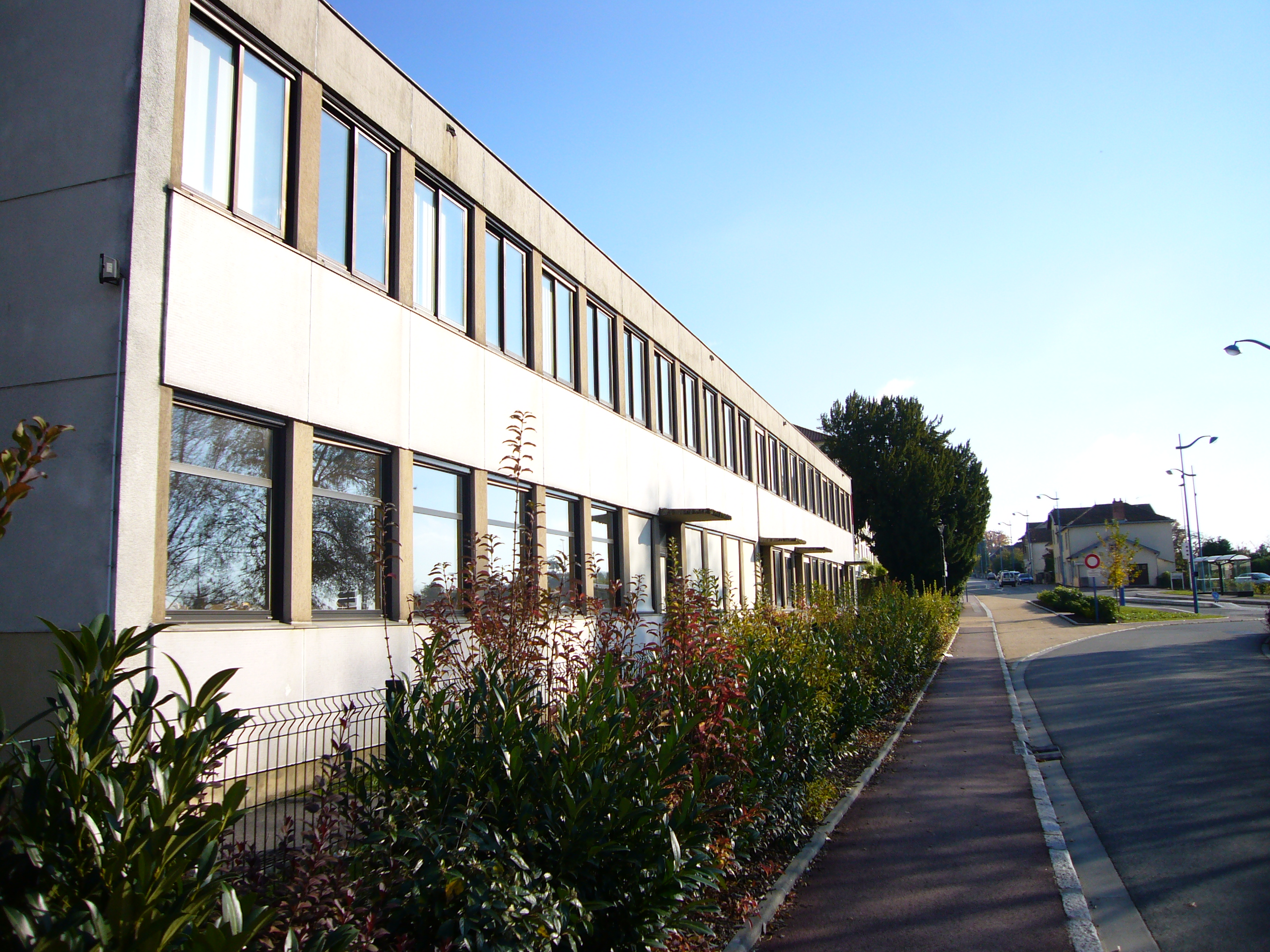 L'école élémentaire de Panazol et l'avenue Jean Jaurès (87, France)